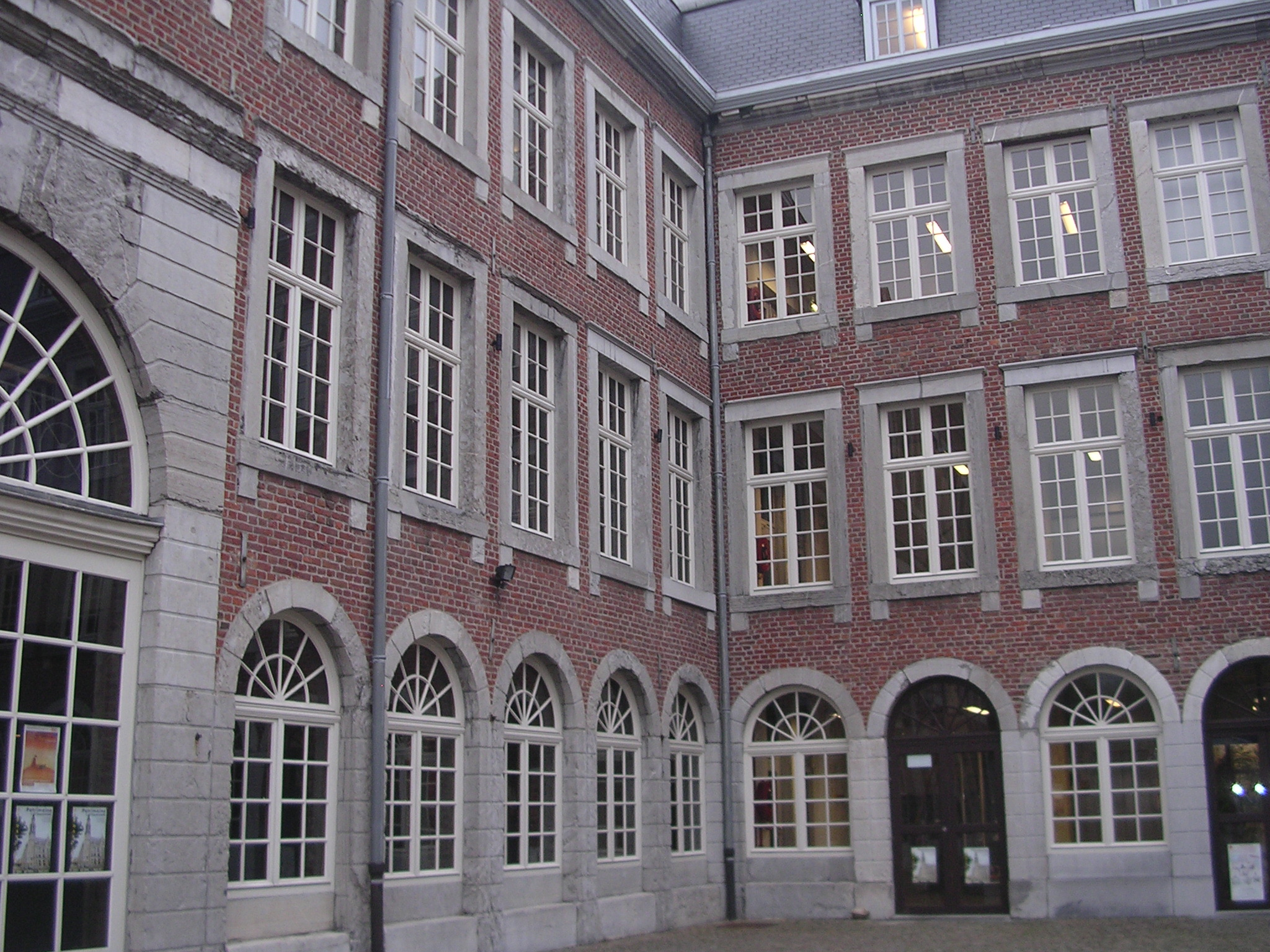 actuel Musée de la Mode et du Textile